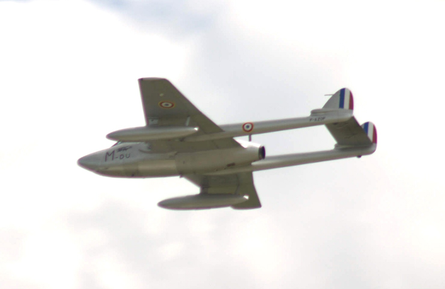 De Habiland Vampire